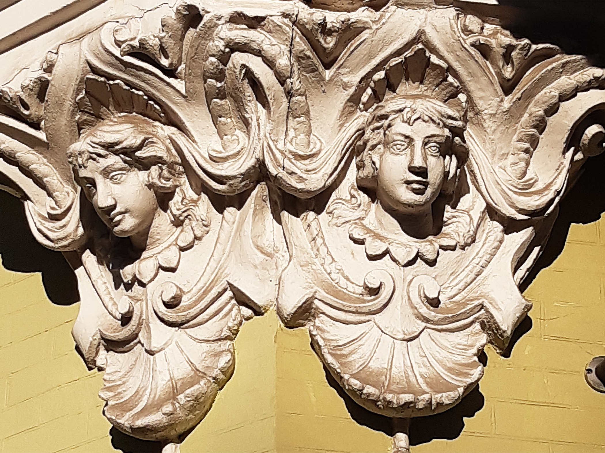 Жилий будинок, Київ, вул. Б. Хмельницького, 40/25